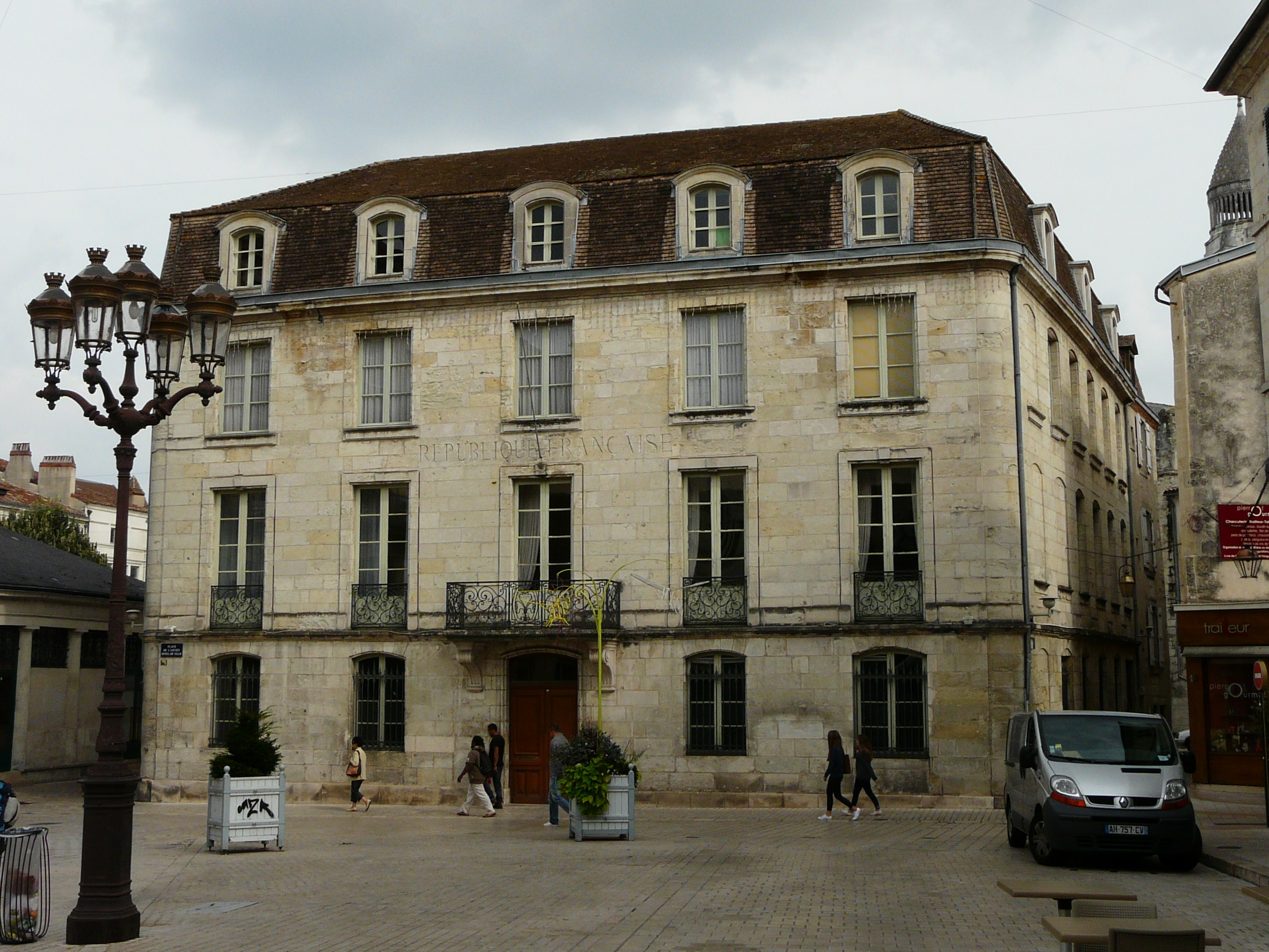 L'hôtel de Lagrange-Chancel, ancien hôtel de ville de Périgueux, Dordogne, France.